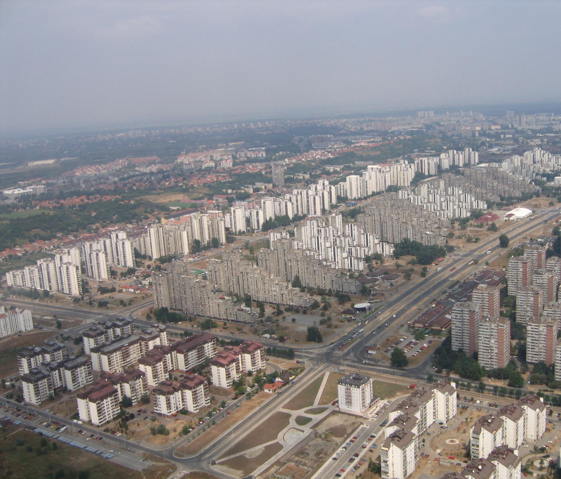 Photographie du quartier Bežanijski Blokovi dans la municipalité de Novi Beograd à Belgrade